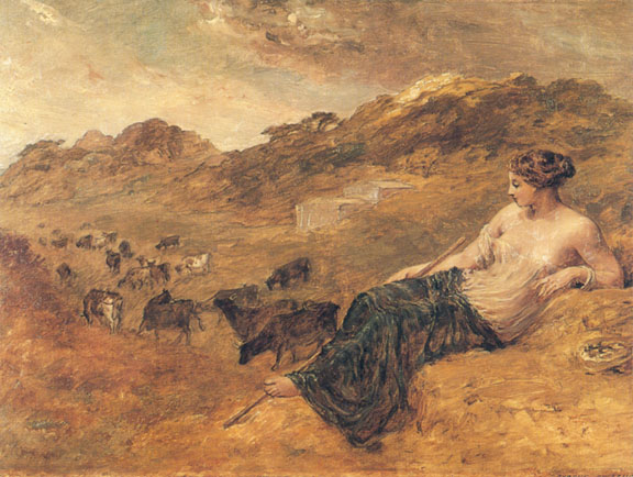 Кирена и стока